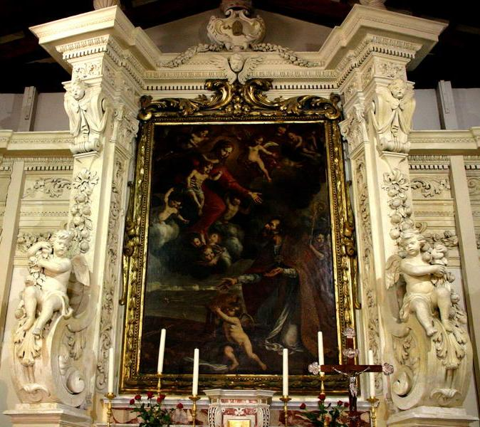 Church Messina Chiesa di Santa Rita